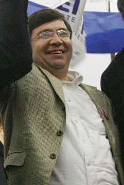 Eduardo Frei en Isla de Maipo